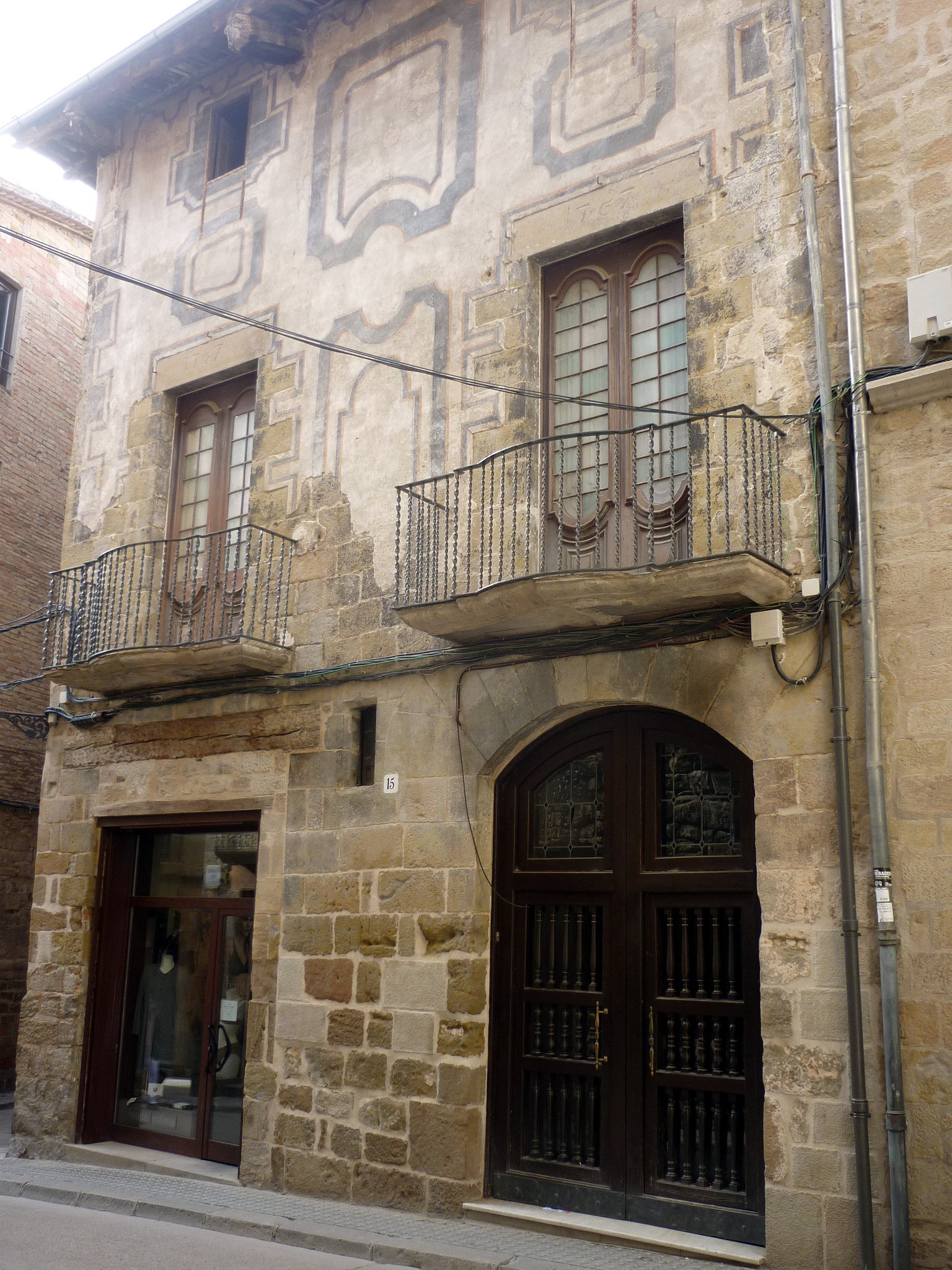 Farmàcia Pallarès (Solsona)